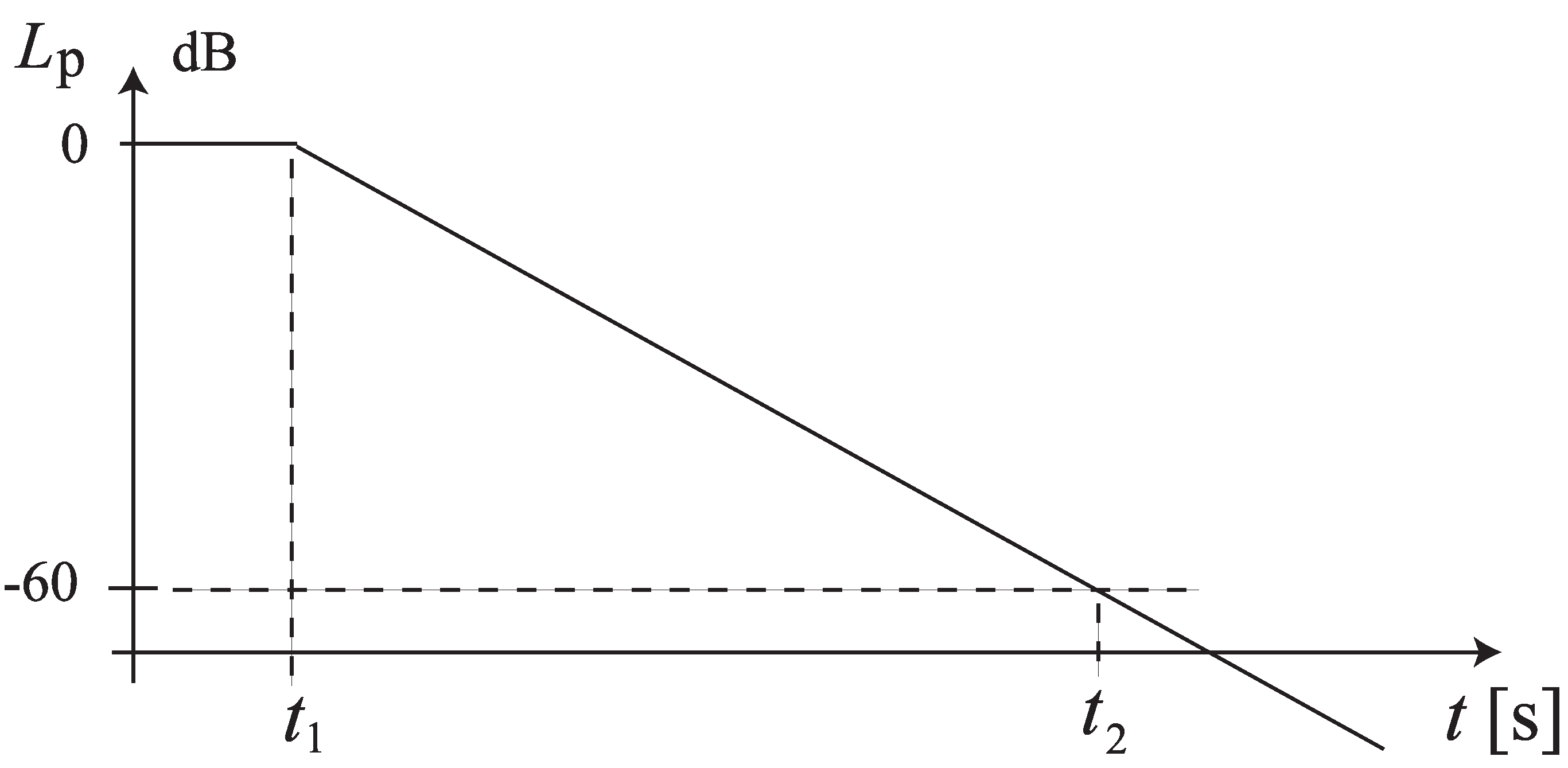 Courbe de réverbération